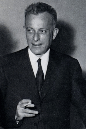 Immagine precedente il 1988 di Giulio Einaudi Fonte:einaudi.it